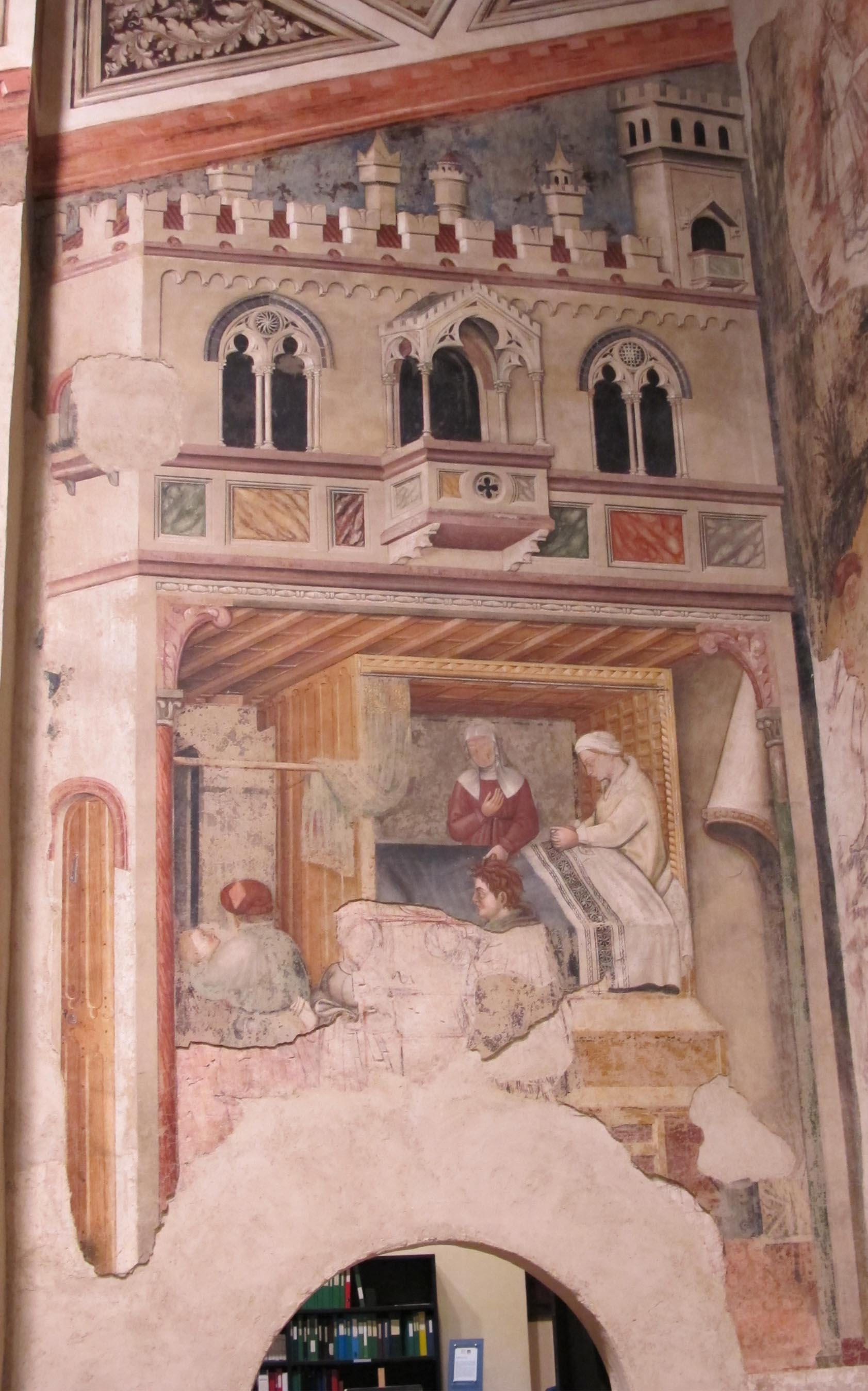 Loggia di romolo e remo 04 nascita di romolo e remo